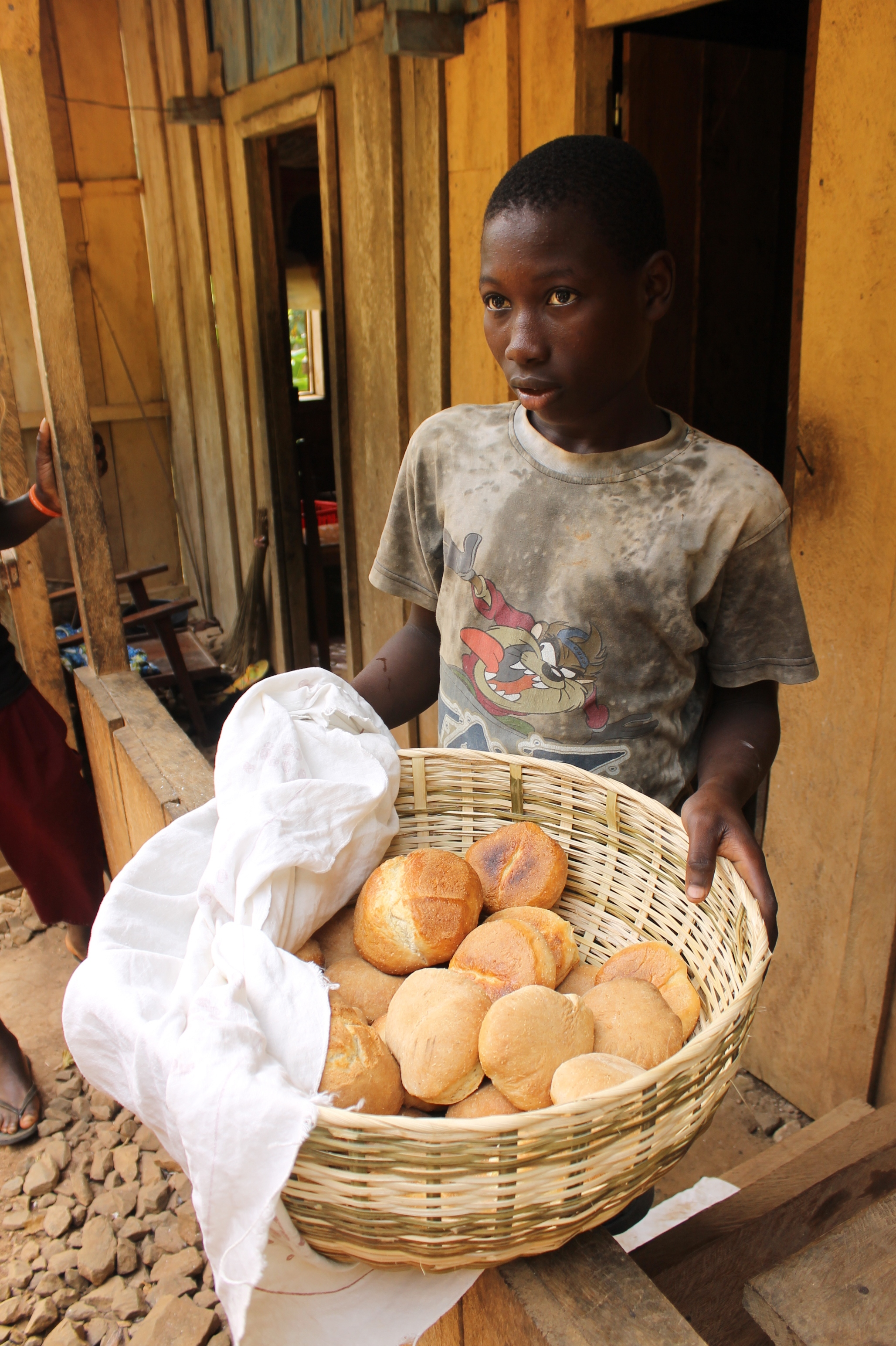 El panadero de Piçao This is an image of the Biosphere Reserve: Island of Príncipe Biosphere Reserve